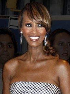 Supermodel Iman